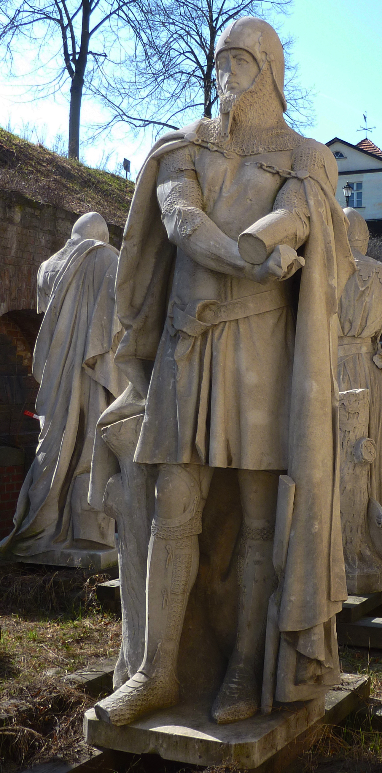 Siegesallee Gruppe 8 Waldemar, enthüllt 1900, Plastiker Reinhold Begas, Standort zZ Zitadelle Spandau